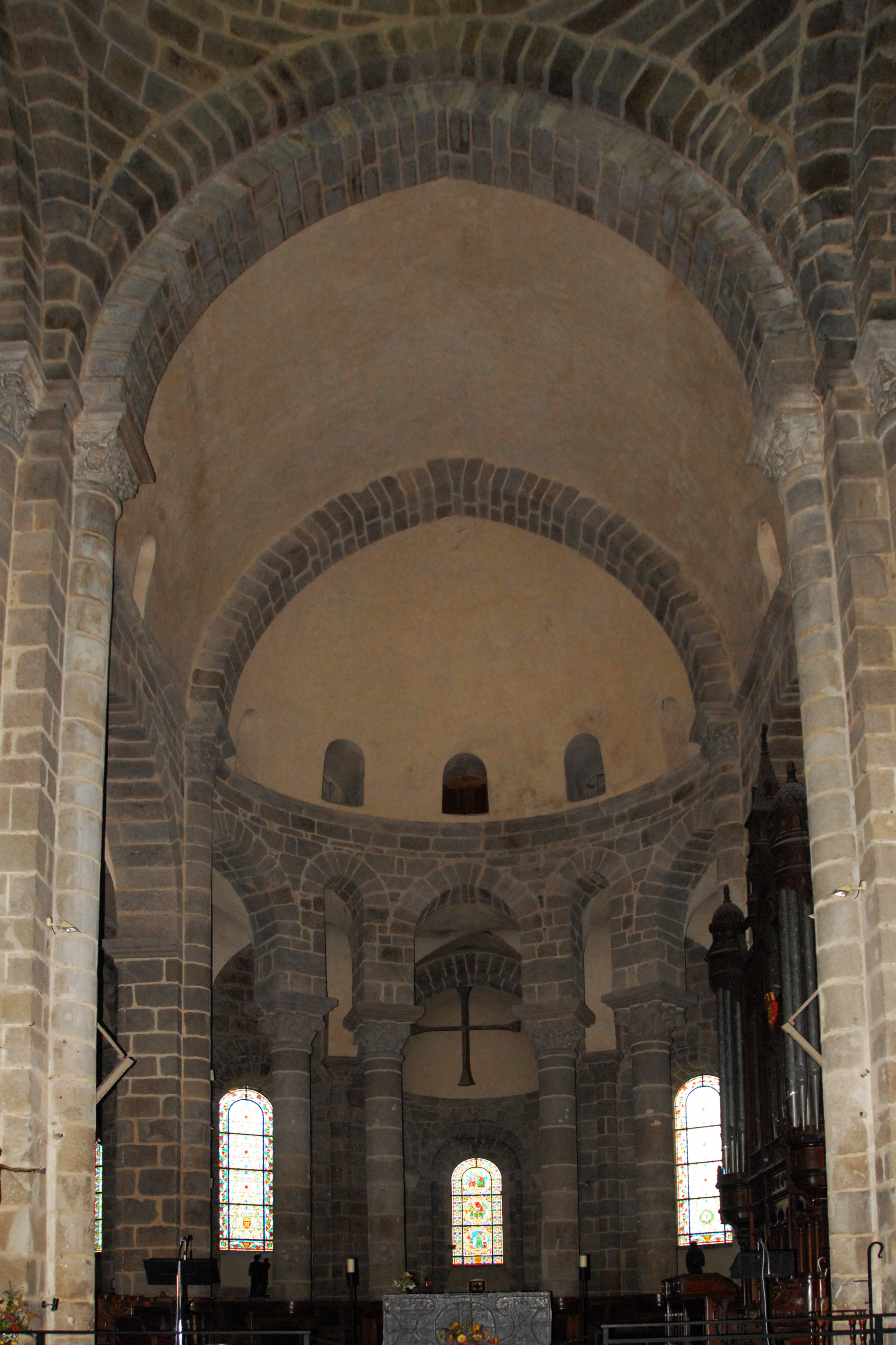 St-Pierre de Le Dorat, Chor aus Vierung